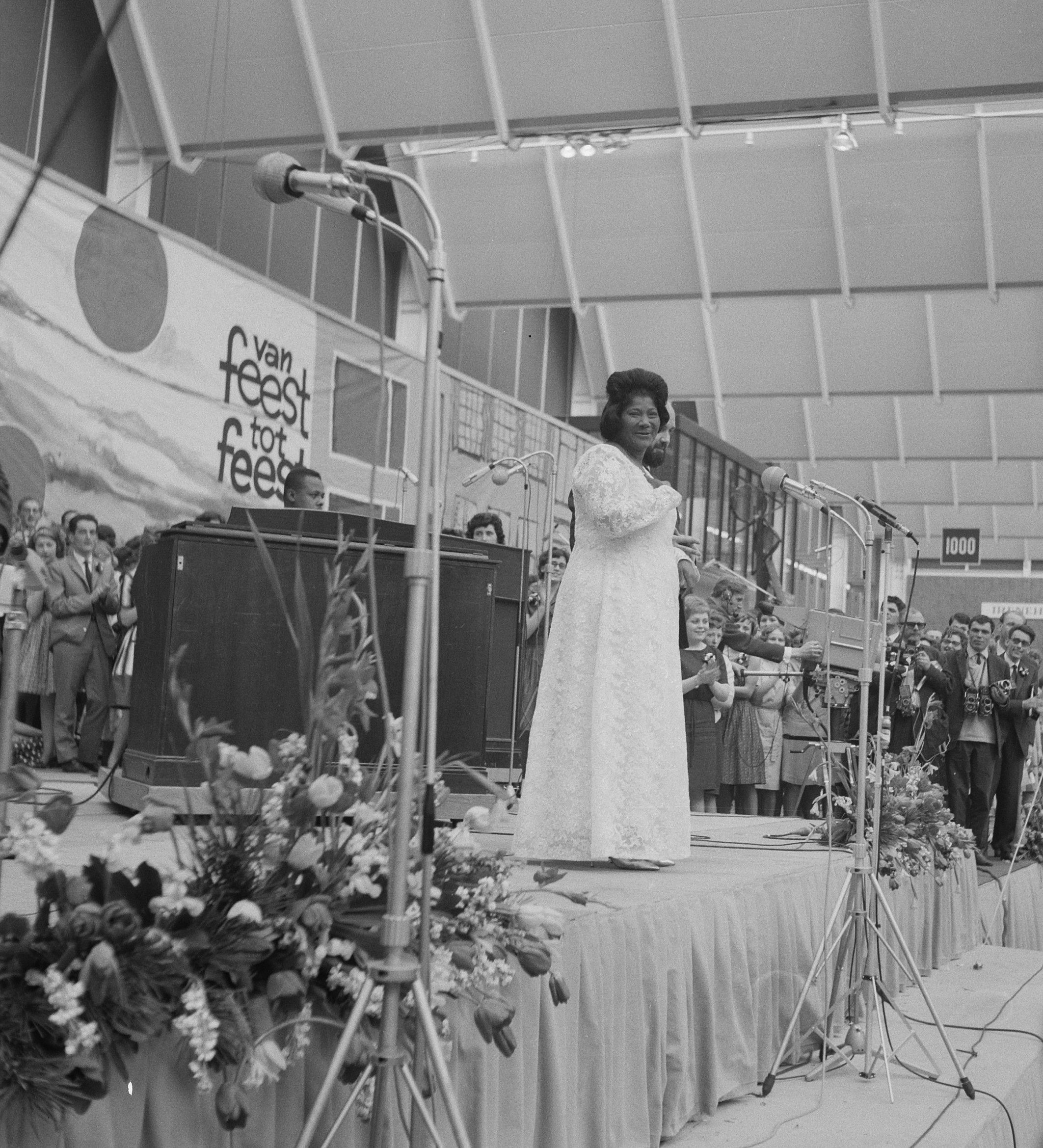 Mahalia Jackson tijdens haar optreden in de Irenehal in Utrecht voor jeugdmanifestatie Jeugd en Bijbel (Irenehal, Jaarbeurs Utrecht, 7 mei 1964)